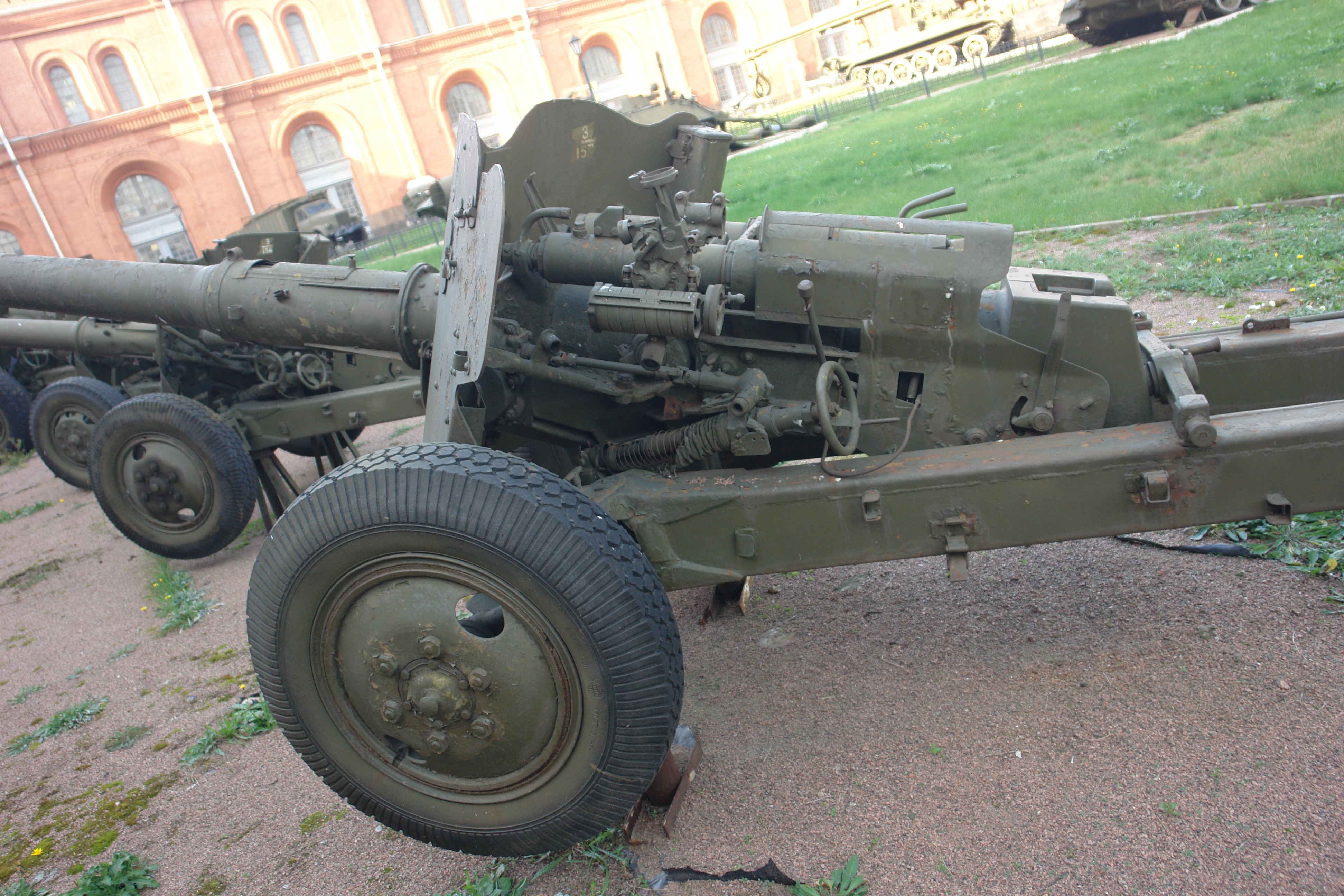 85-мм противотанковая пушка Д-48 (1953). Главный конструктор Ф.Ф. Петров Дальность, м: стрельбы - 18970, прямого выстрела - 1200. Скорострельность - 15 выстр/мин Масса орудия -2350 кг. Военно-исторический музей артиллерии, инженерных войск и войск связи, Санкт-Петербург.